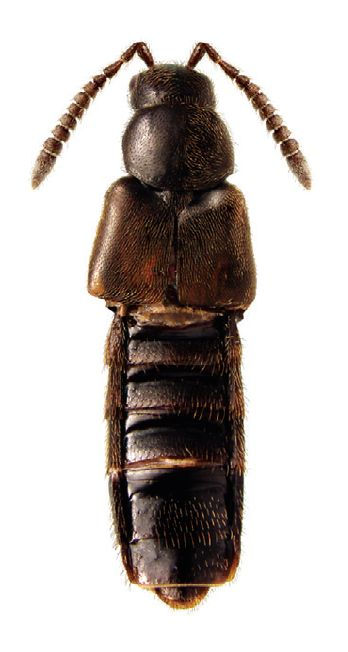 Earota dentata